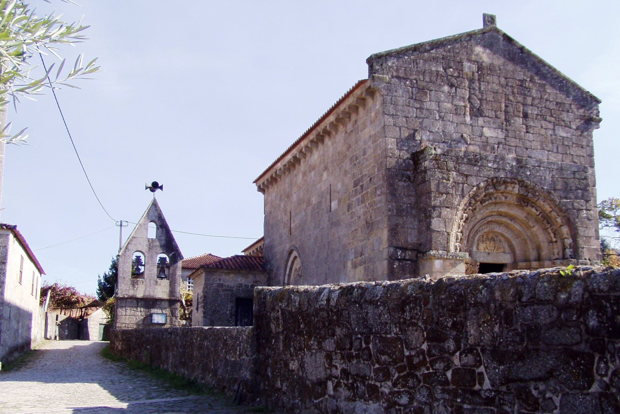 Igreja românica, localizada em Bravães, Ponte da Barca, Portugal